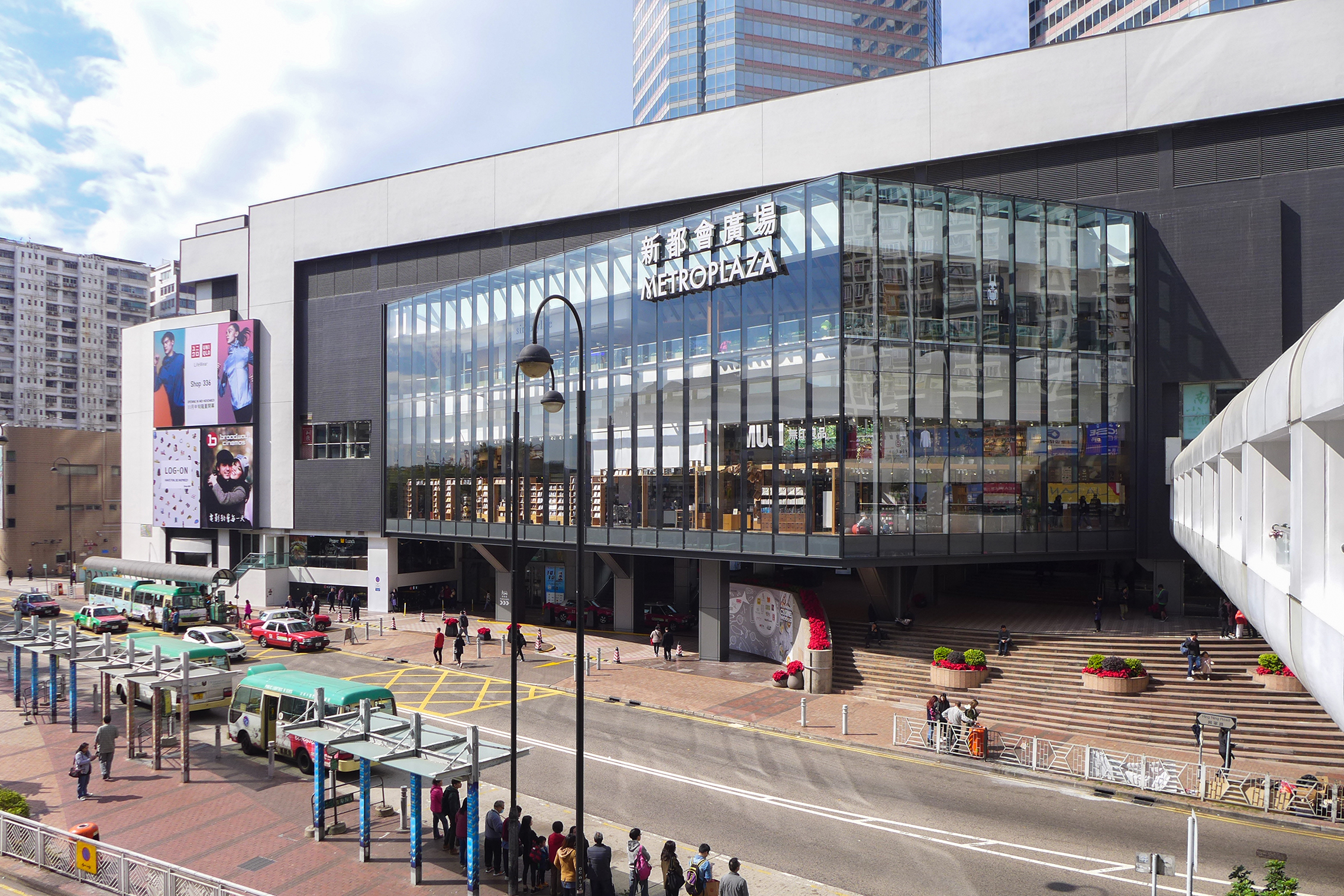 Metroplaza facade after renovation